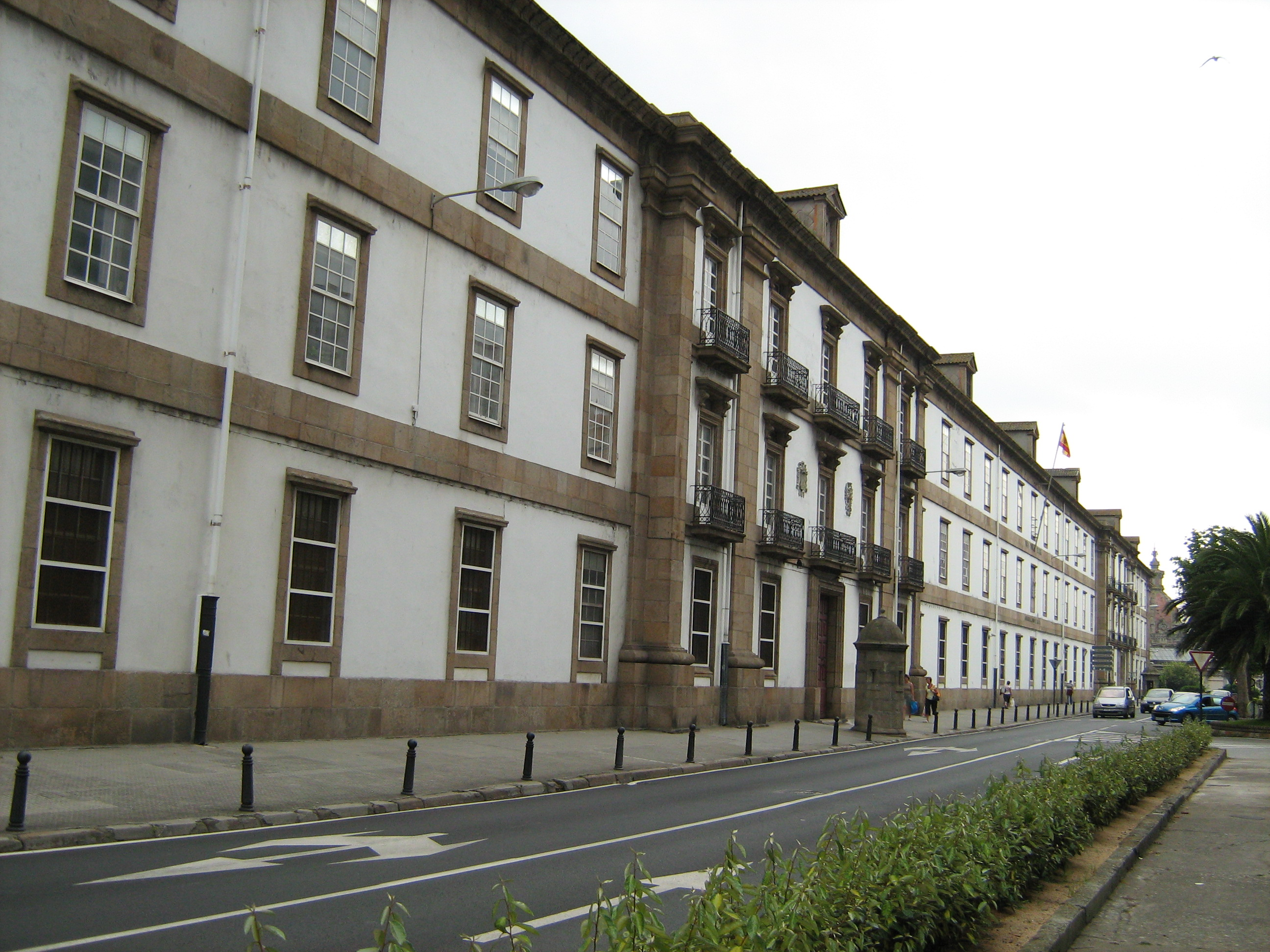 Cuartel de Atocha, na Coruña